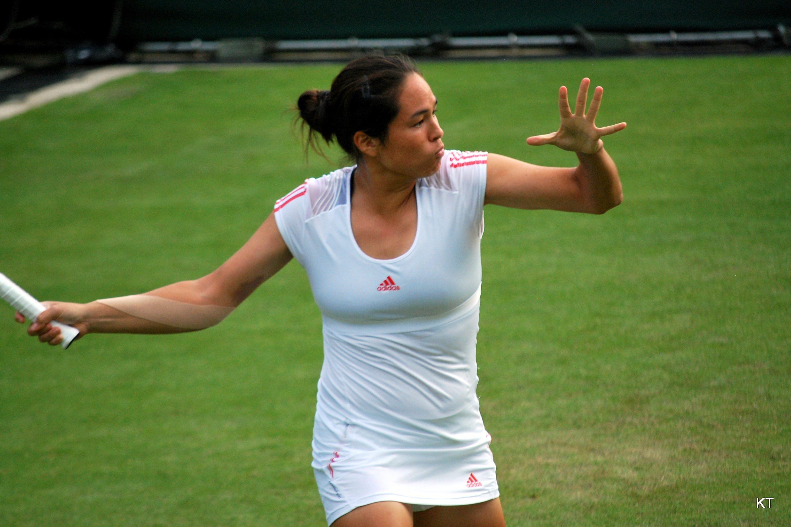 Jamie Hampton